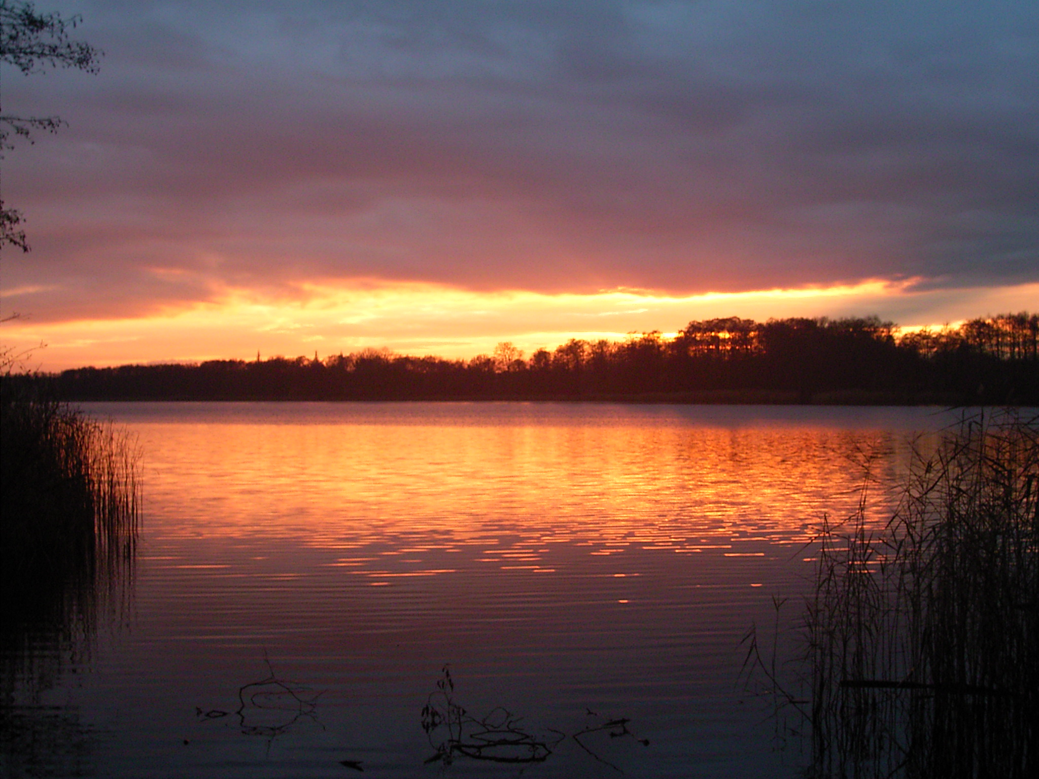 "Sonnenuntergang in Senzig"